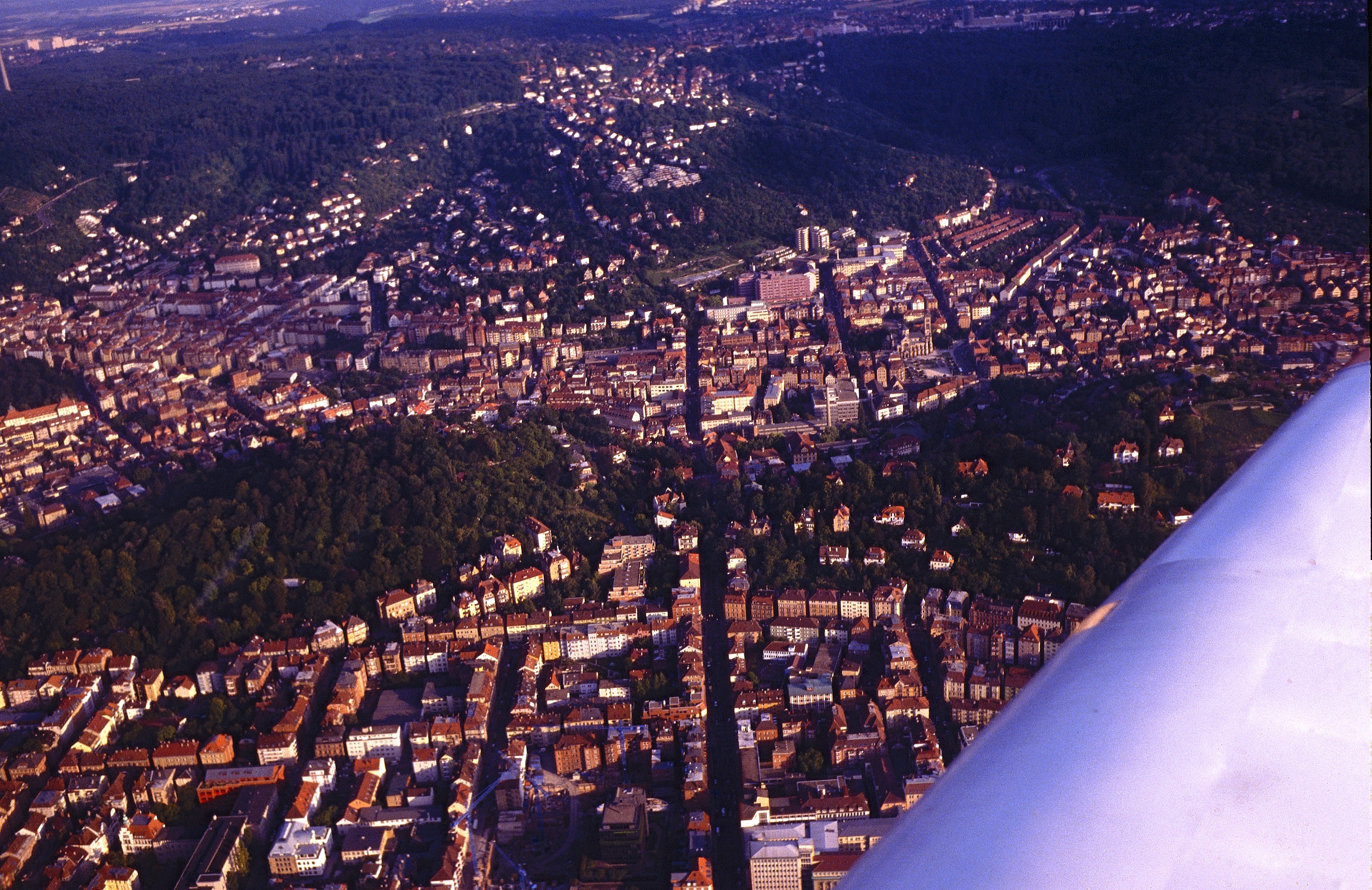 Aug. 1993 Flug über Heslach - im oberen Teil - und Stgt.-West unten - Gert D. Geissler